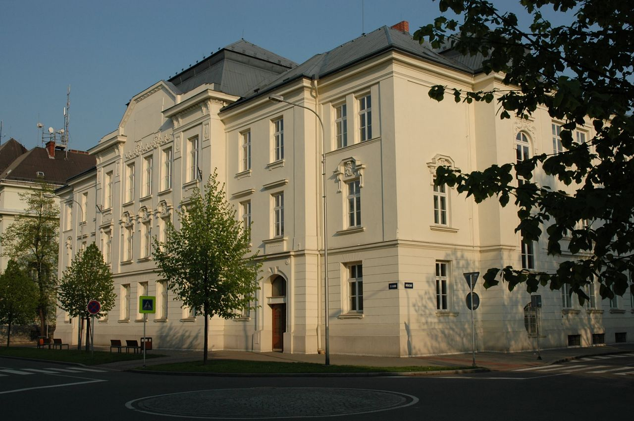 Budova děkanátu Přírodovědecké fakulty Ostravské univerzity)